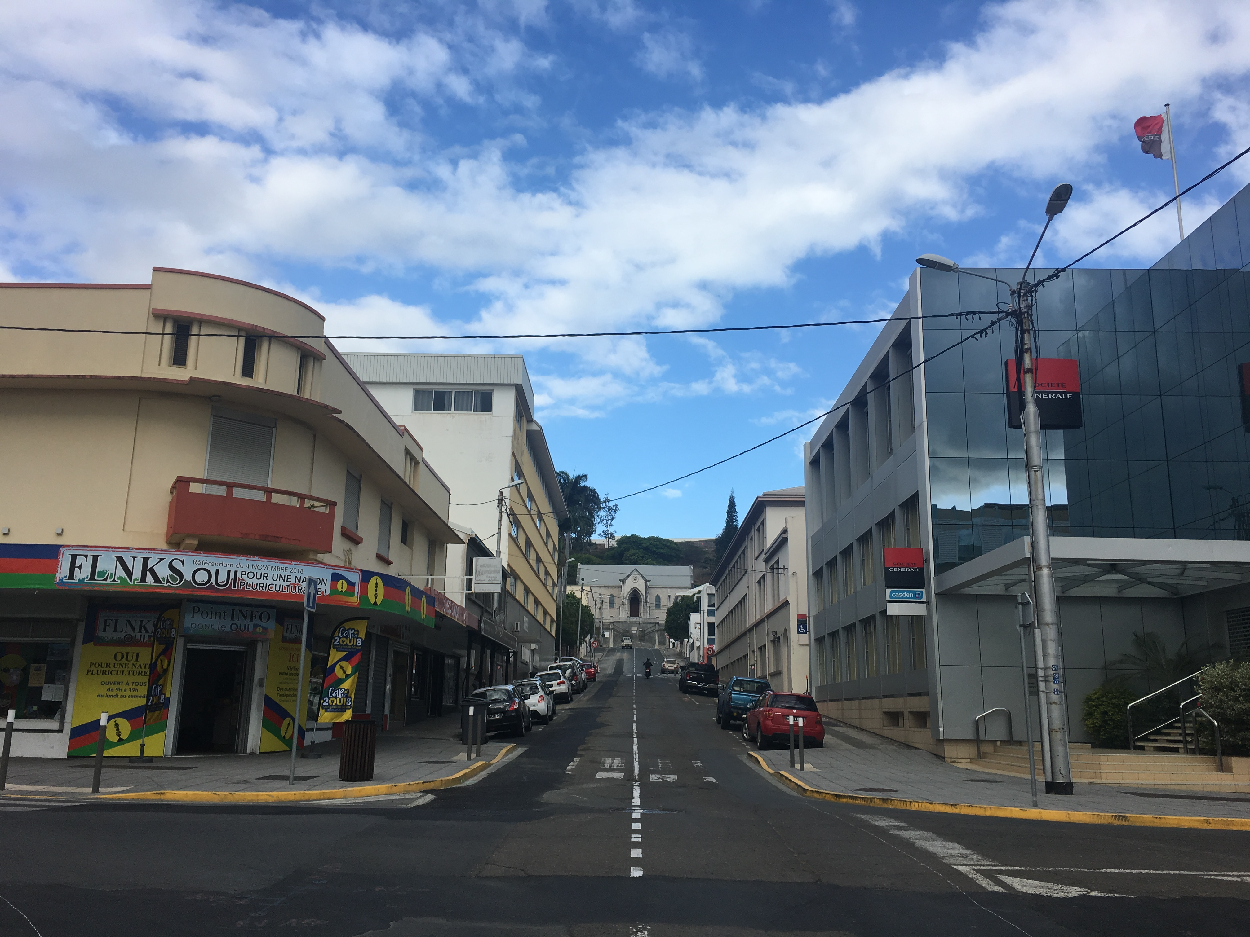 Vieux temple protestant de Nouméa.